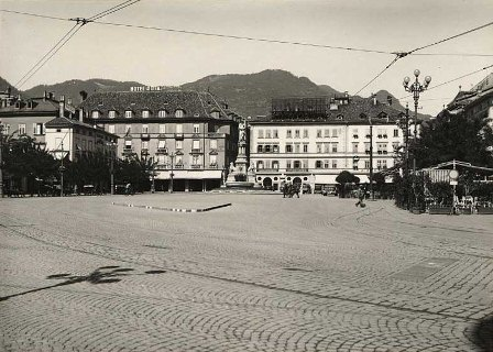 Bolzano, piazza Walter con bnari